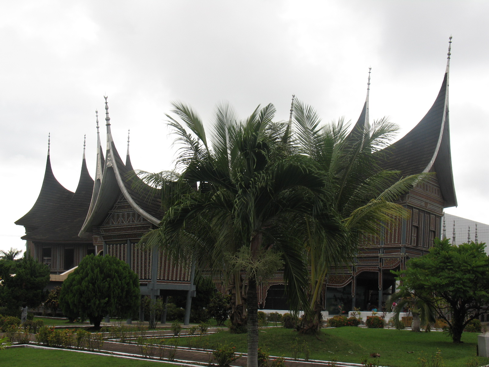 Foto museum Adityawarman di Padang